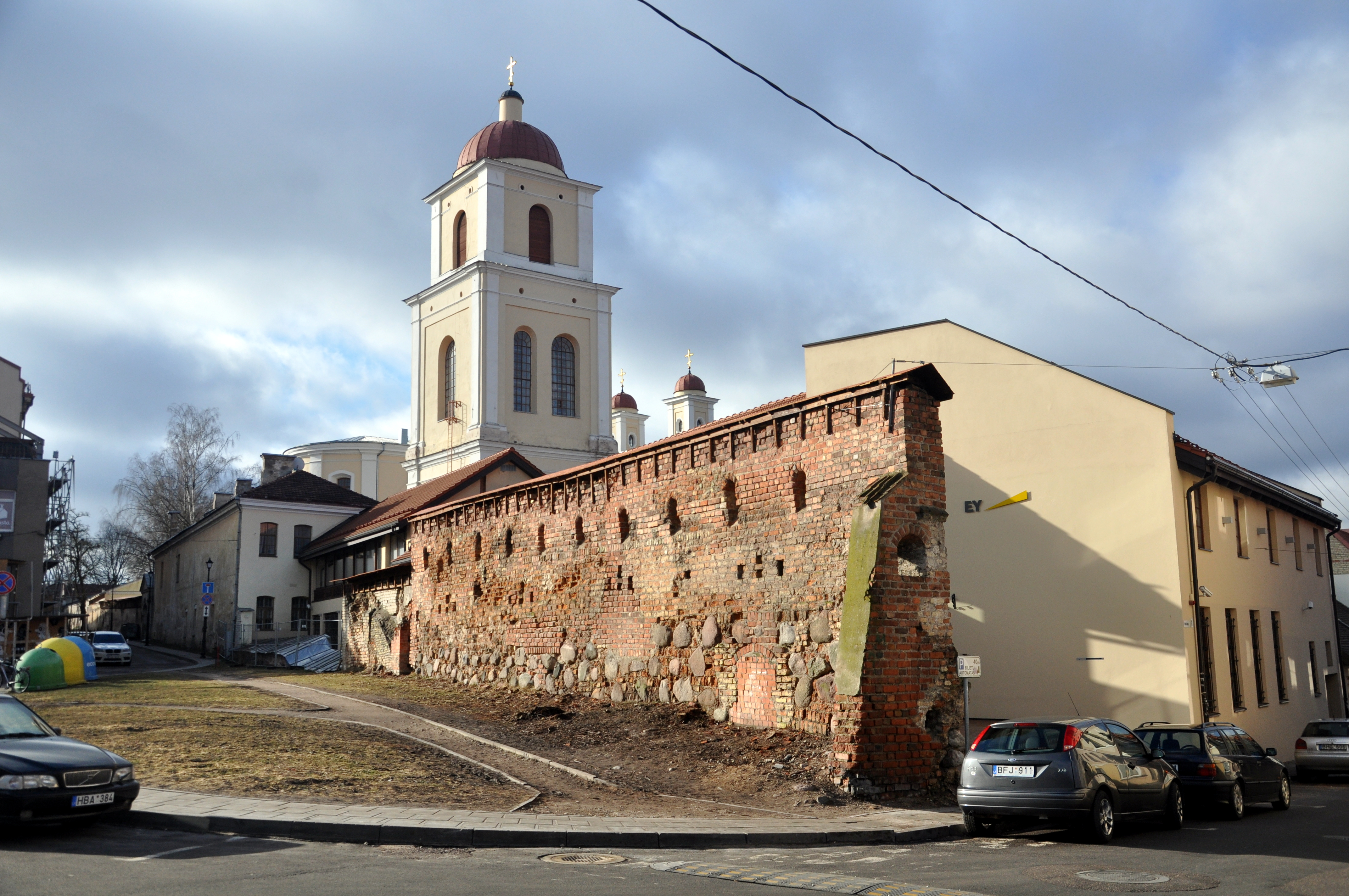 Wilno, cerkiew św. Ducha, najstarsza świątynia prawosławna Wilna. Dzwonnica widziana zza murów miejskich, z okolic domu pod adresem Subocz 15 (róg Głuchego zaułka).